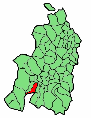 aipaturiko udalerriaren kokapena Nafarroa Beherean